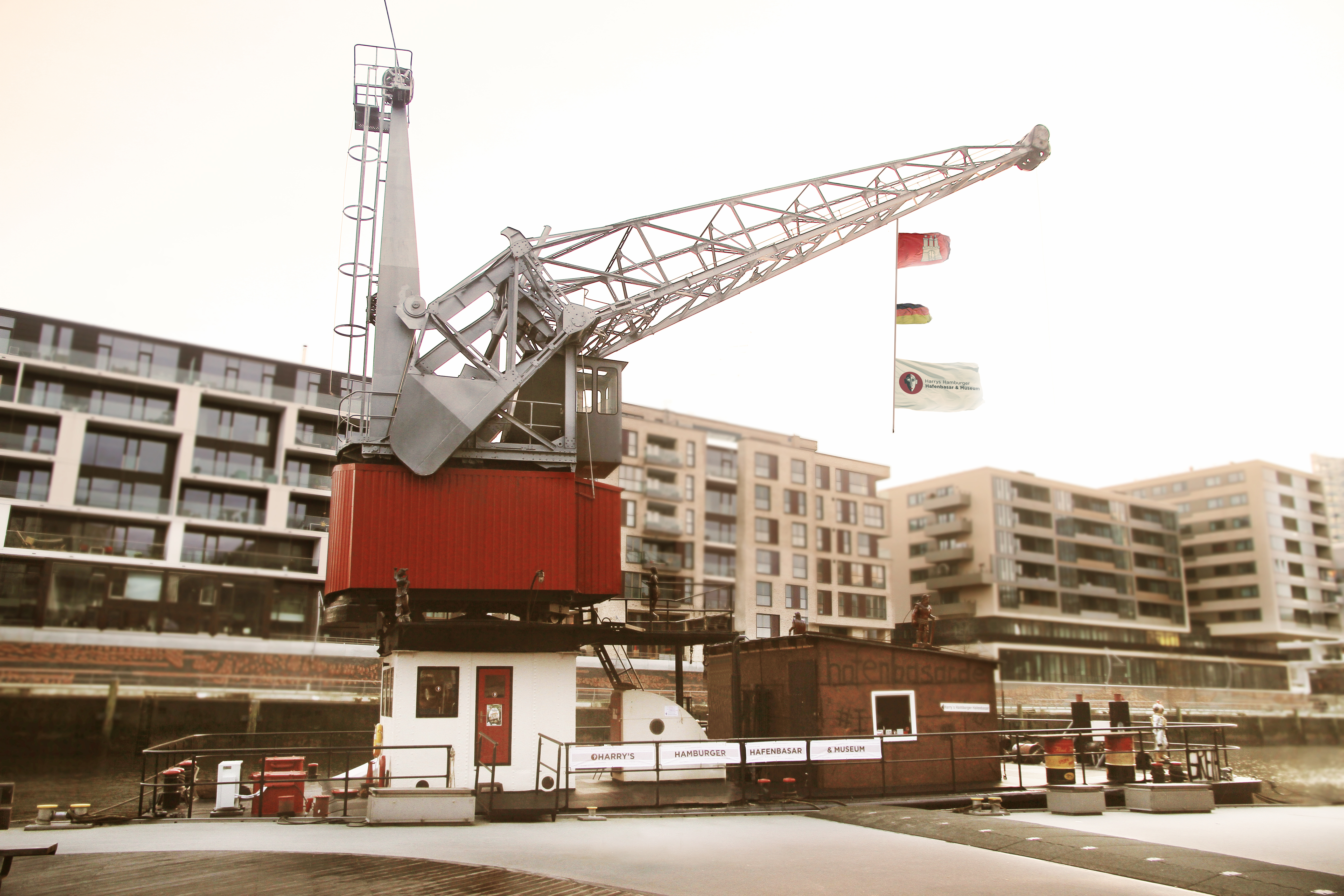 Die aktuelle Location des Hafenbasars im Traditionsschiffhafen in der Hafencity, Hamburg.